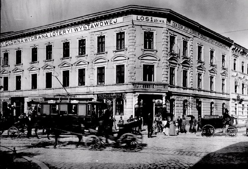 Будинок на початку вул. Левицького у Львові: Будинок на початку вулиці Левицького, що існував до 1911 року. Баннер на будинку інформує про лотерею, з нагоди Загальної вистави Краєвої у Львові. Тобто був розміщений 1894 р.